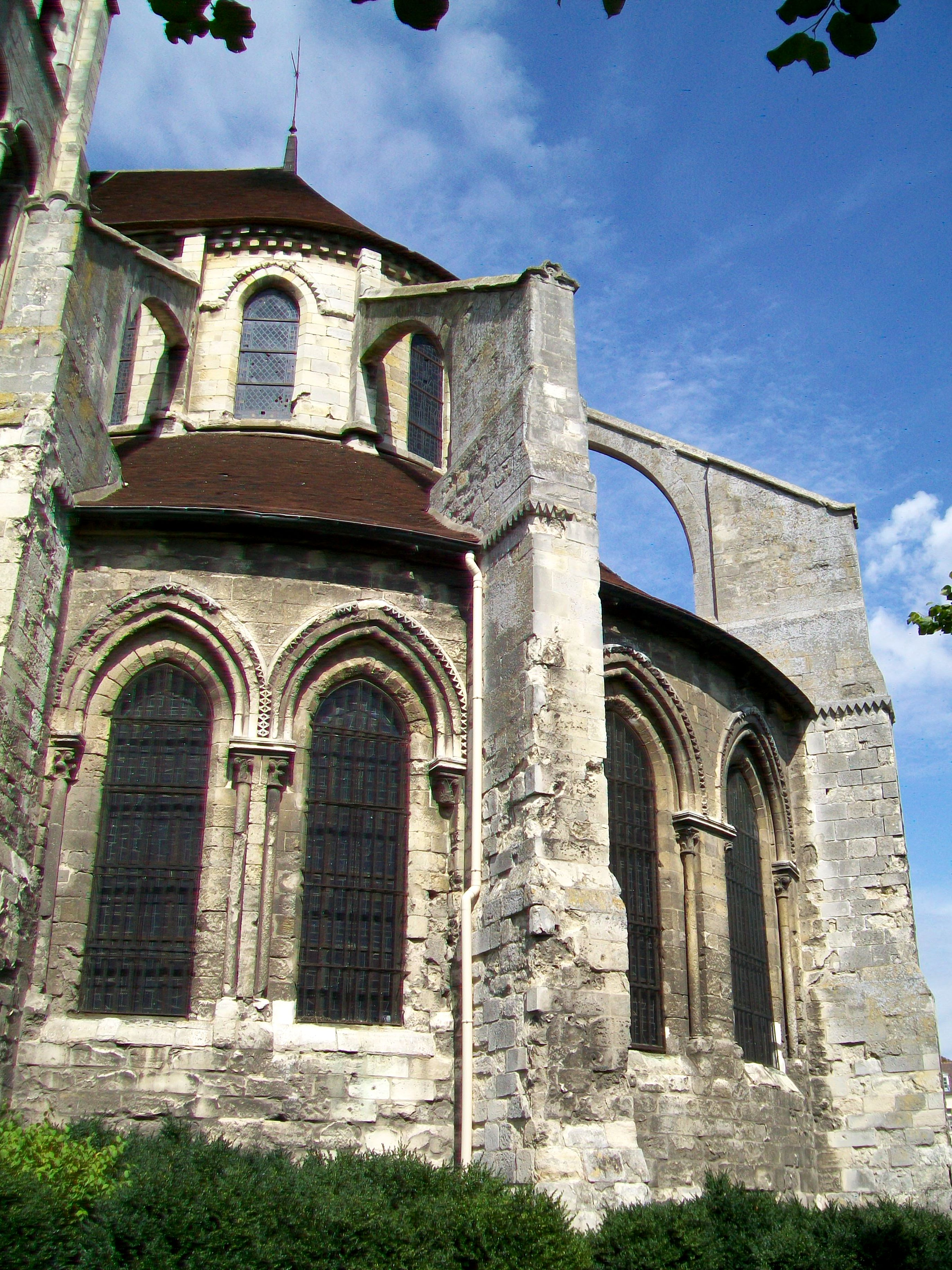 Vue de détail du chœur depuis le sud (jardin de l'église).